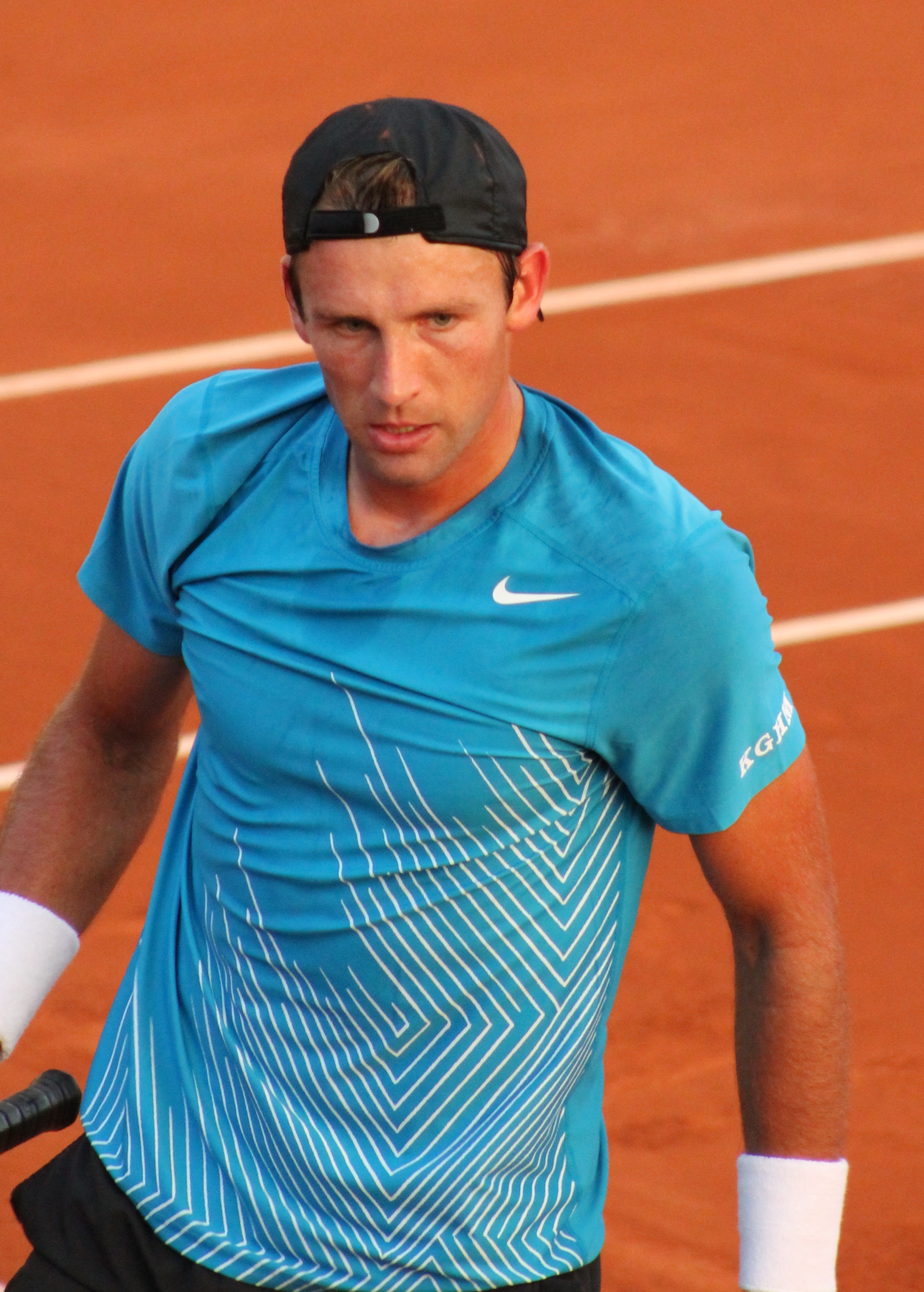 Kubot RG13 (13)